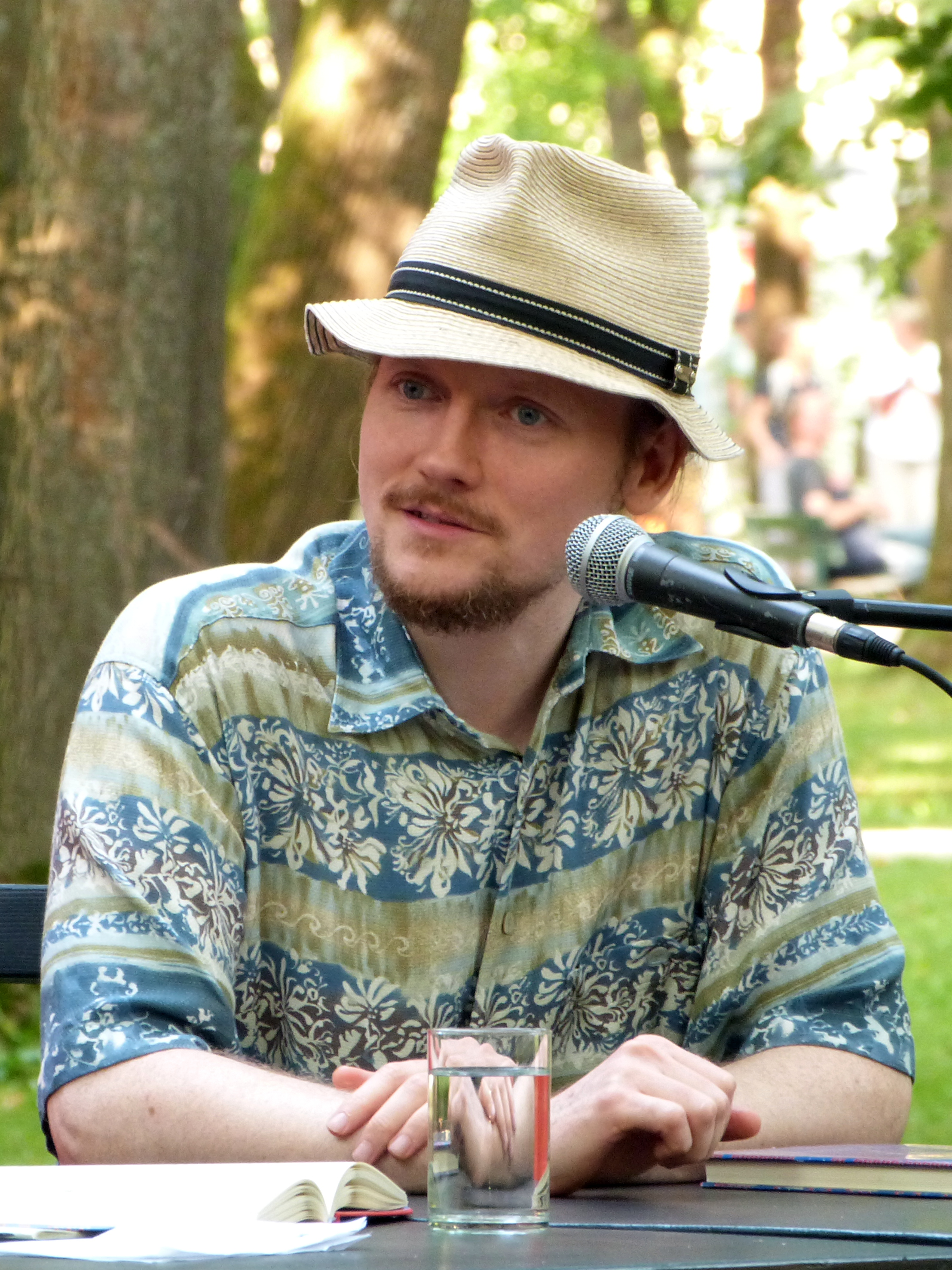 Der Schriftsteller und Lyriker Christian Schloyer während eines Interviews auf dem Erlanger Poetenfest 2017.